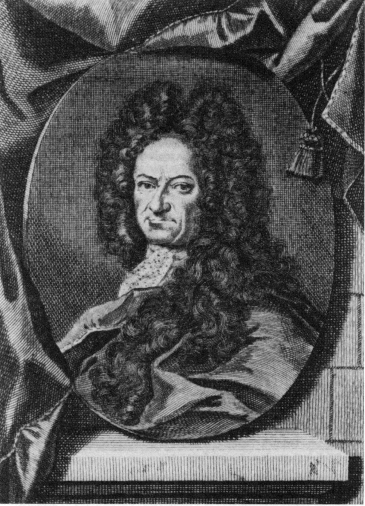 Ein Kupferstich des Philosophen Gottfried Wilhelm Leibniz